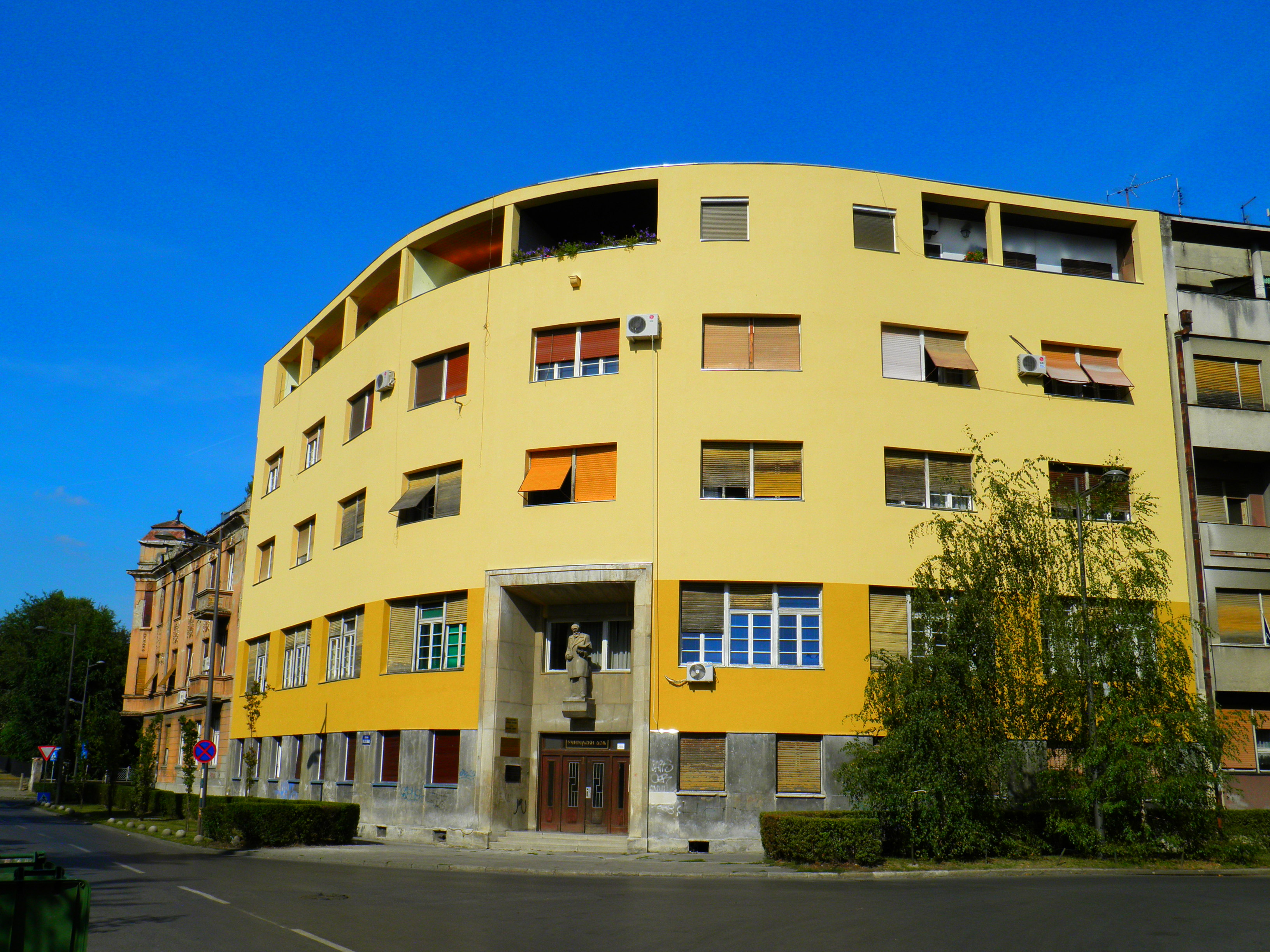 Učiteljski dom